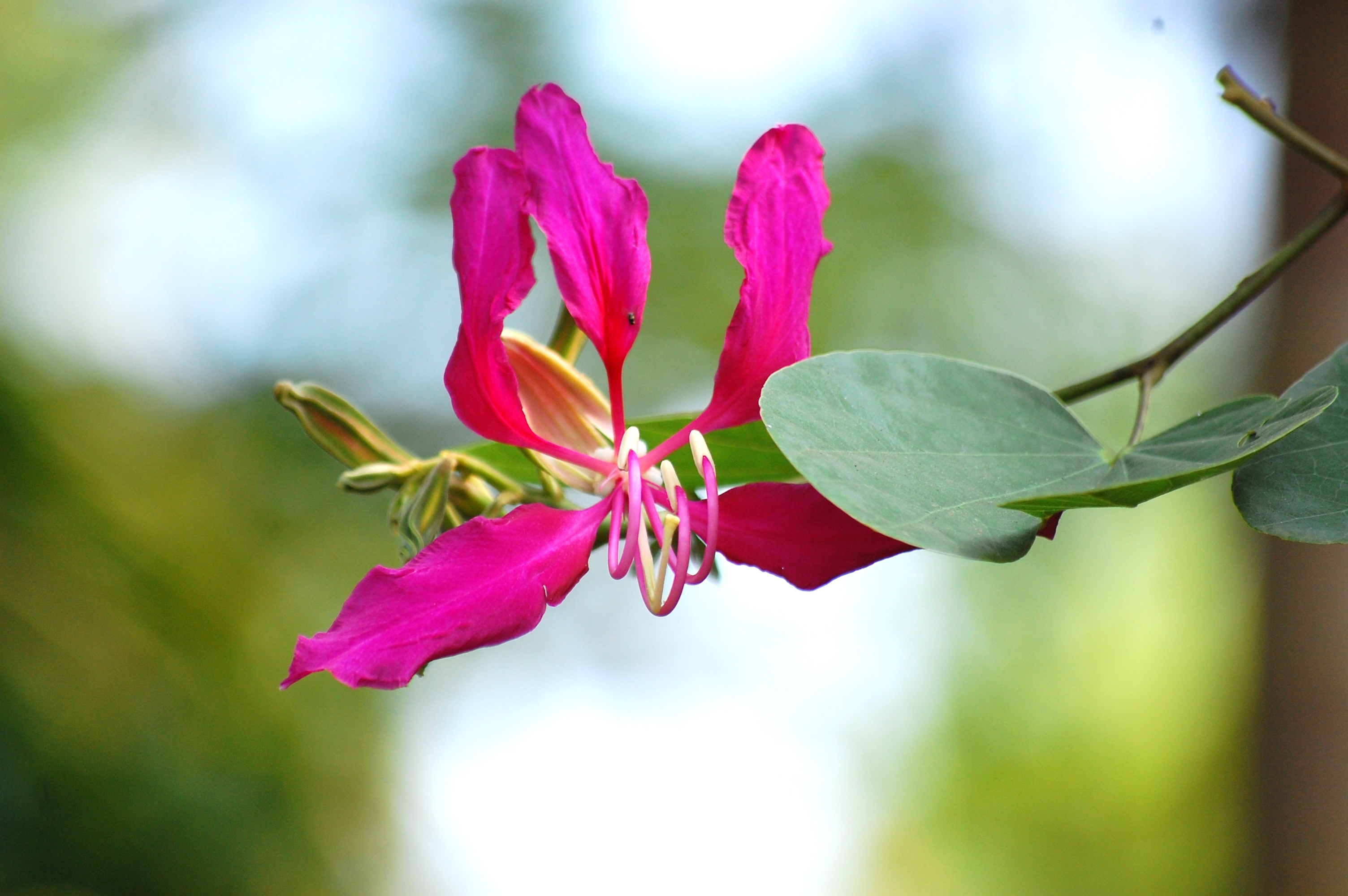 Purple Orchid Tree, ചെമ്മന്ദാരം